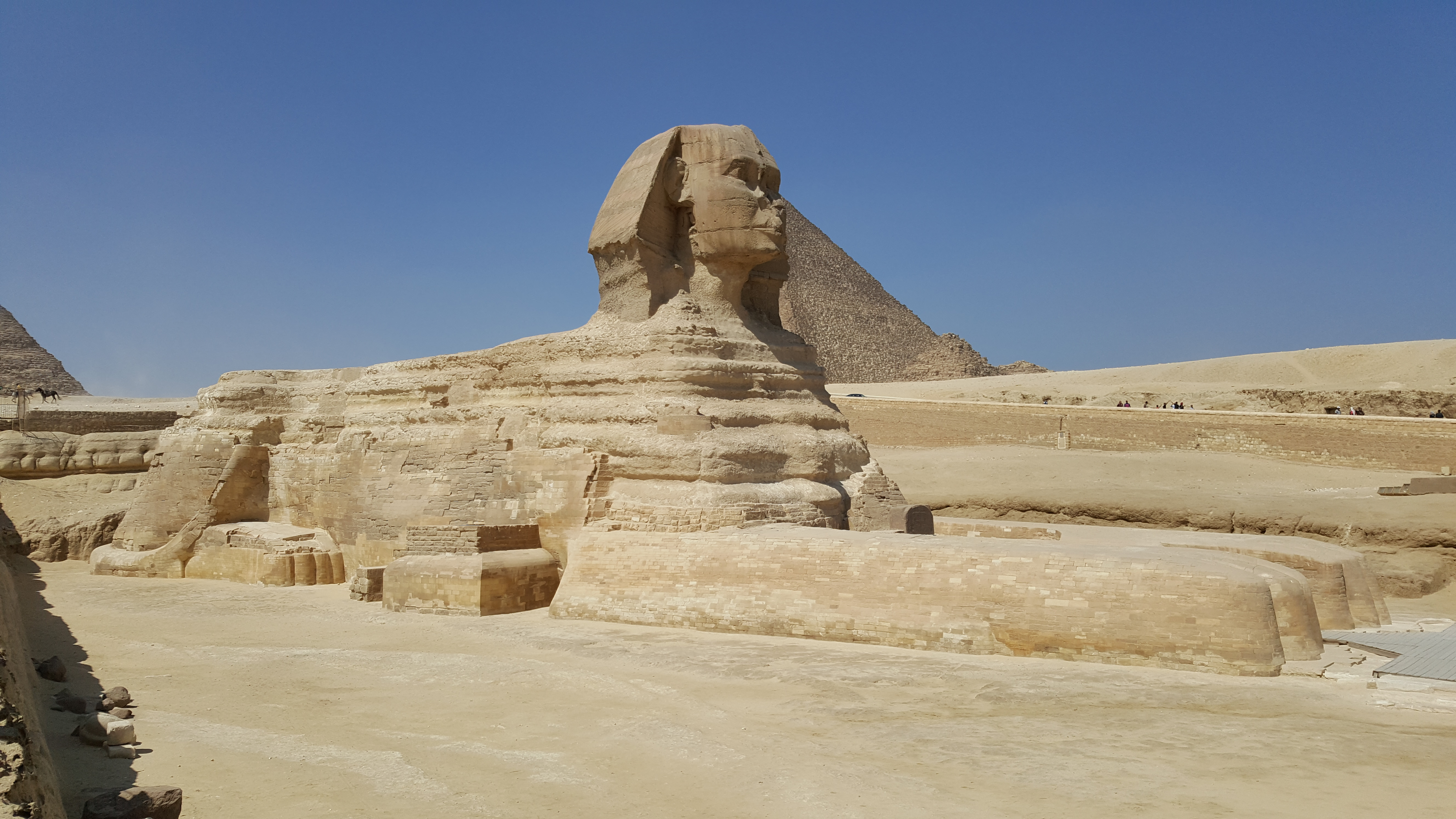 Great Sphinx of Giza